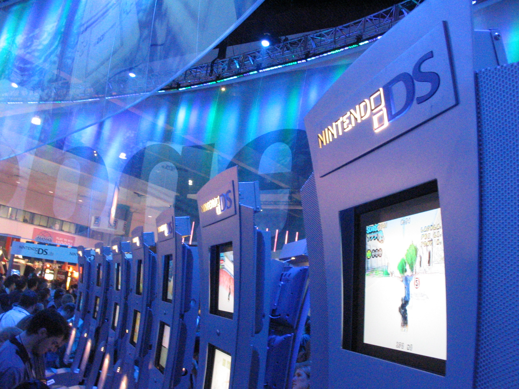 中文（台灣）: Electronic Entertainment Expo 2006，任天堂DS遊戲展示區。